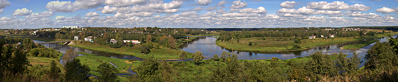 Город Зубцов